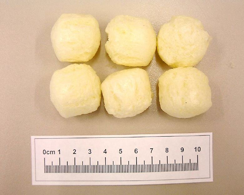 Formierbällchen aus Maisstärke der Fa Loick MHPS